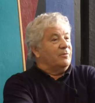 Cor Dam in 2013